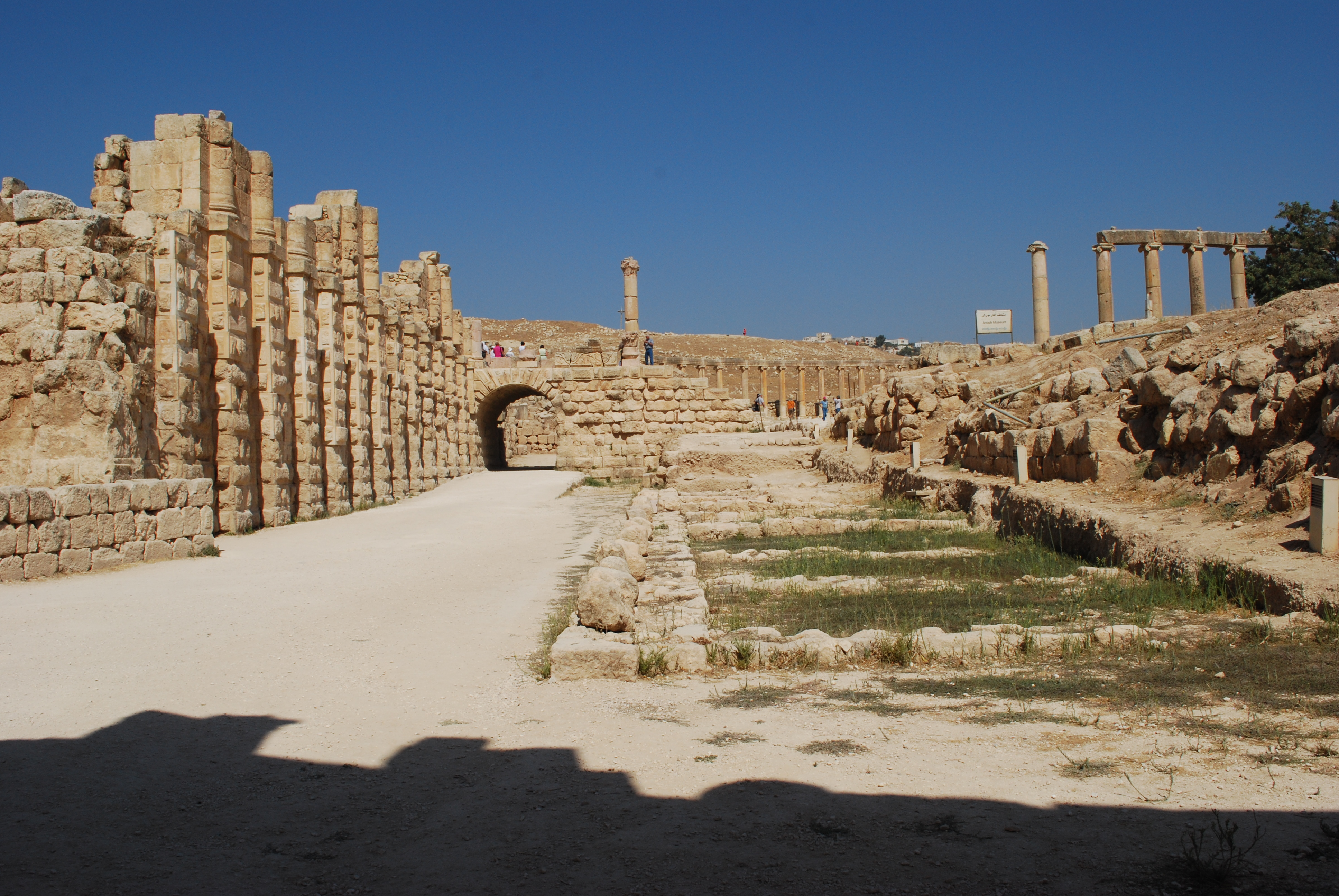 Temenos du temple de Zeus.